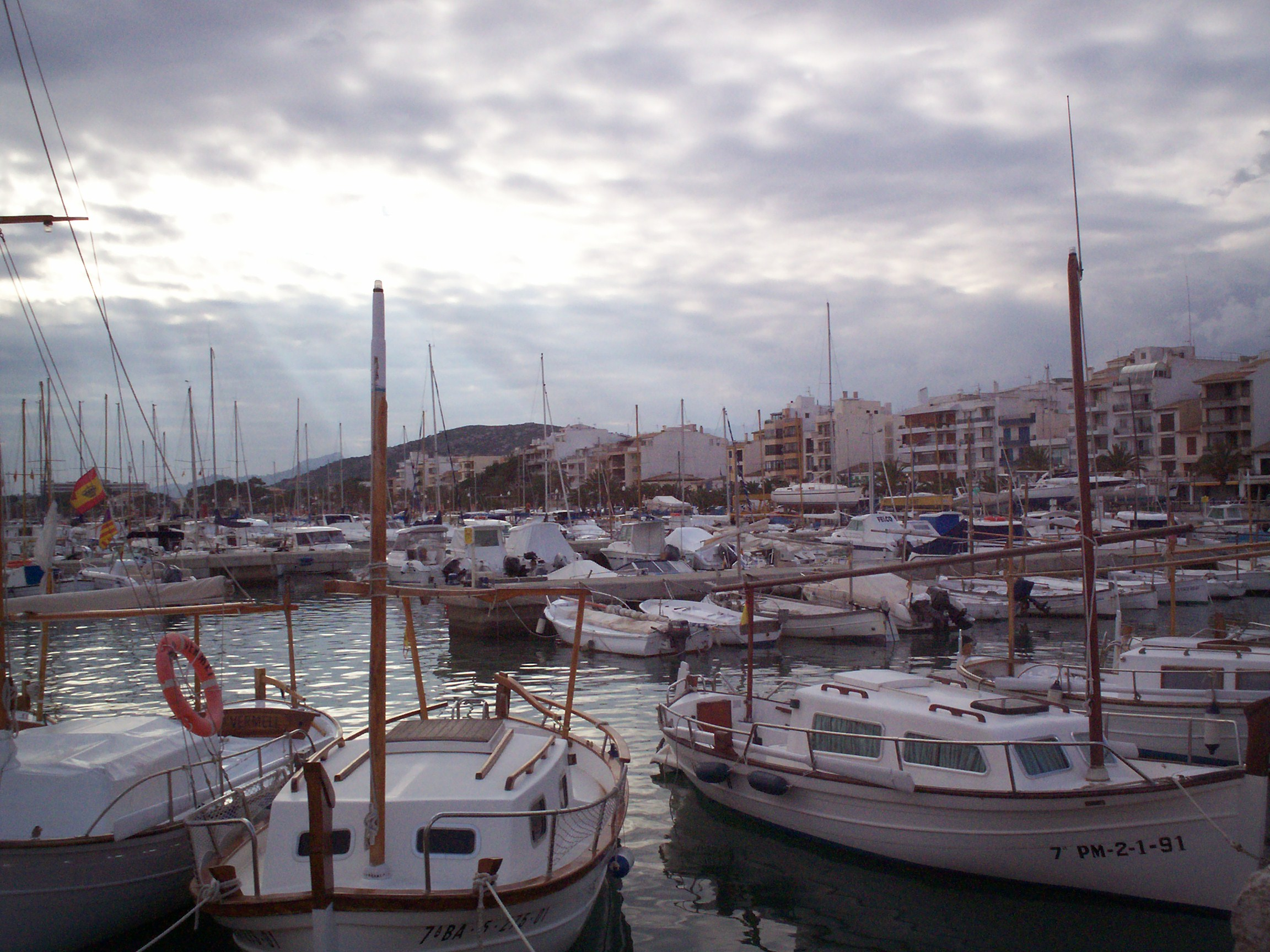 port de pollenca